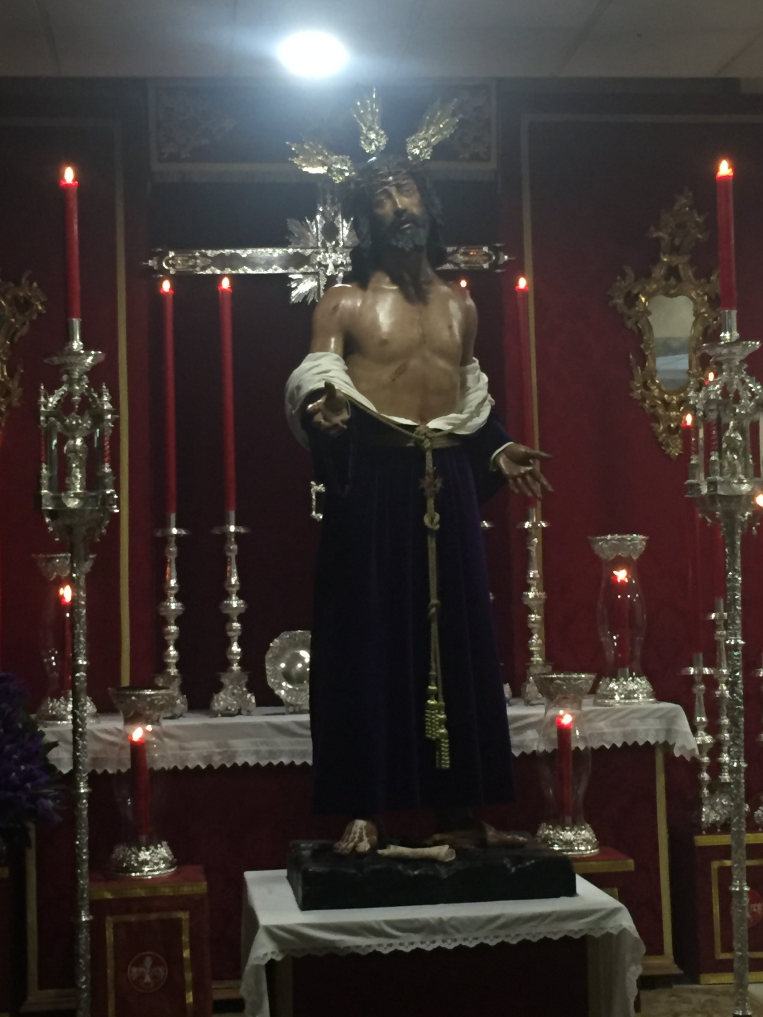 Despojado